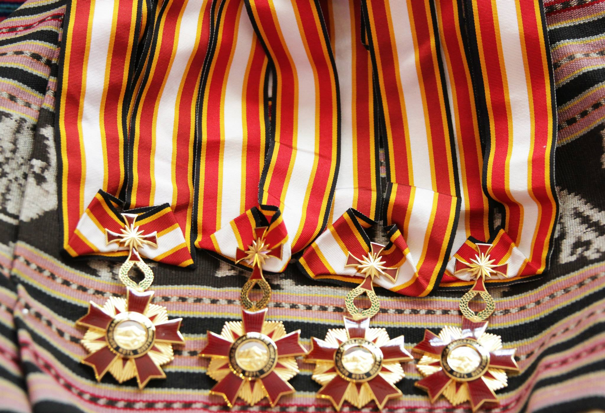 Verleihung des Ordem de Timor-Leste, 30. August 2014.